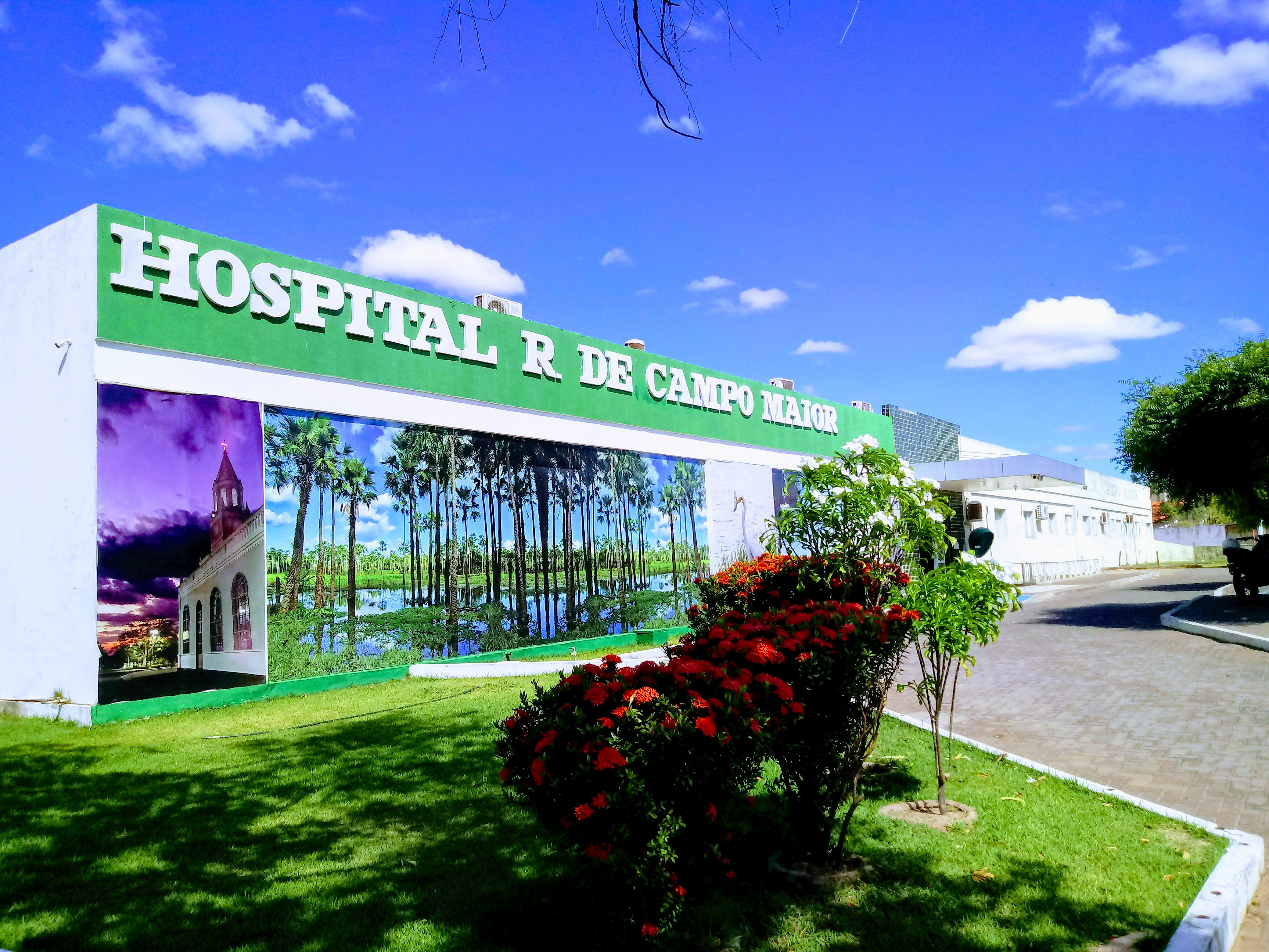 Frente do Hospital Regional de Campo Maior em agosto de 2020.